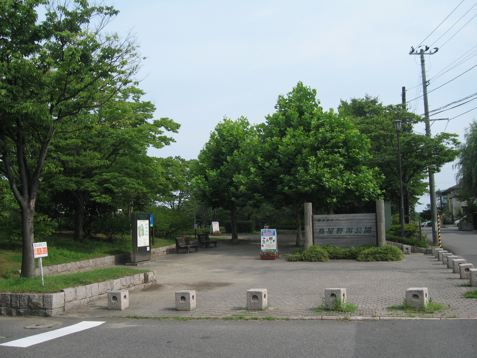 新潟県新潟市中央区。鳥屋野潟公園女池地区の写真。